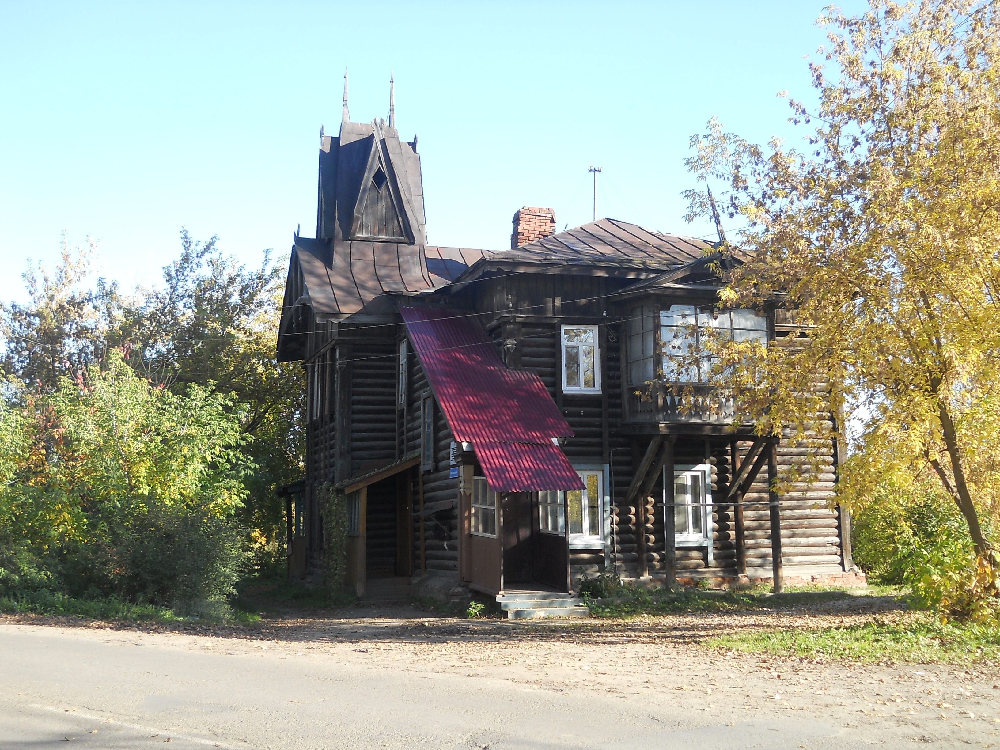 Дом по адресу Томск, ул. Алеутская, 1